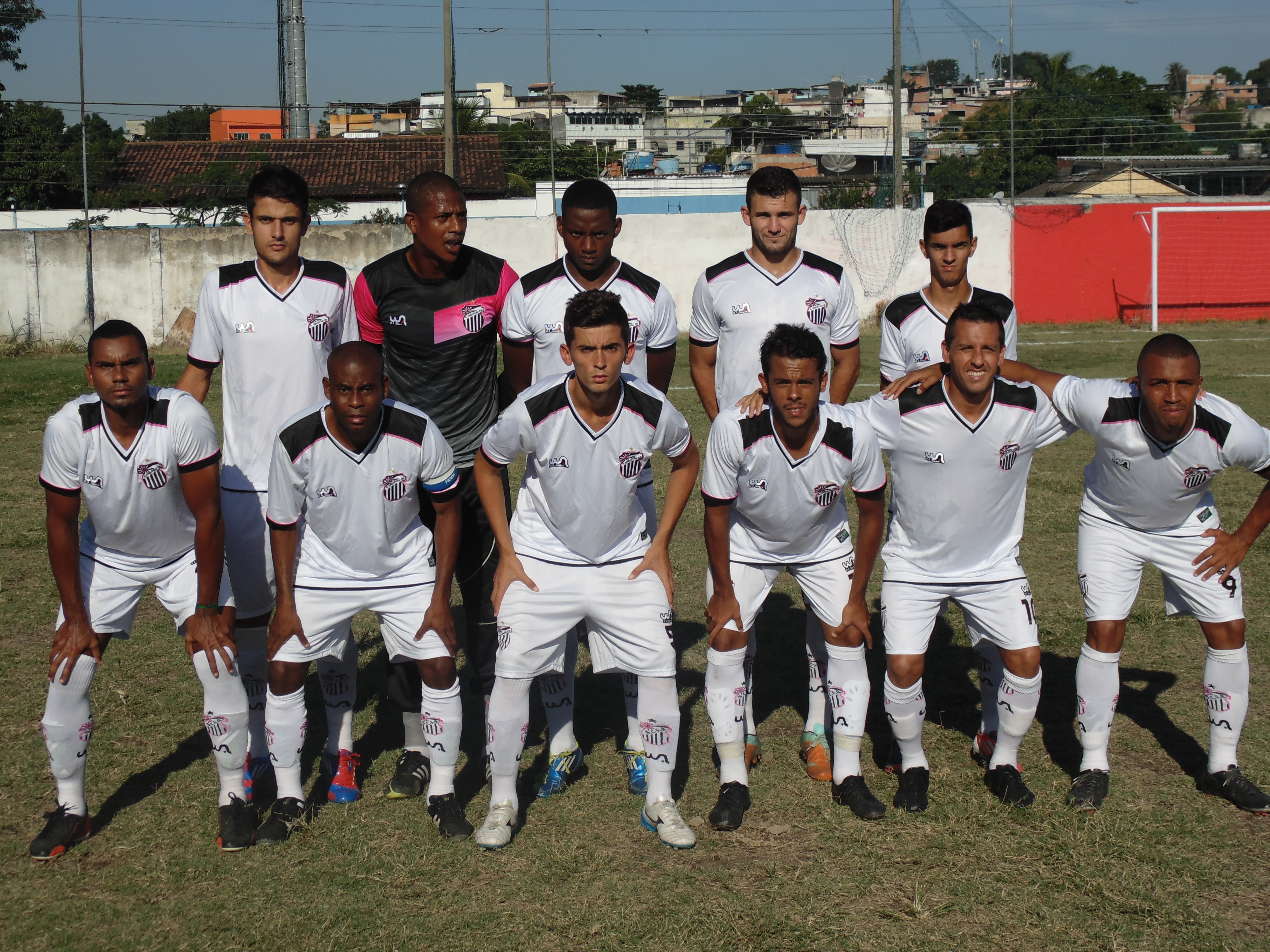 Equipe profissional do São Cristóvão que disputa o Campeonato Estadual da Série C em 2014.